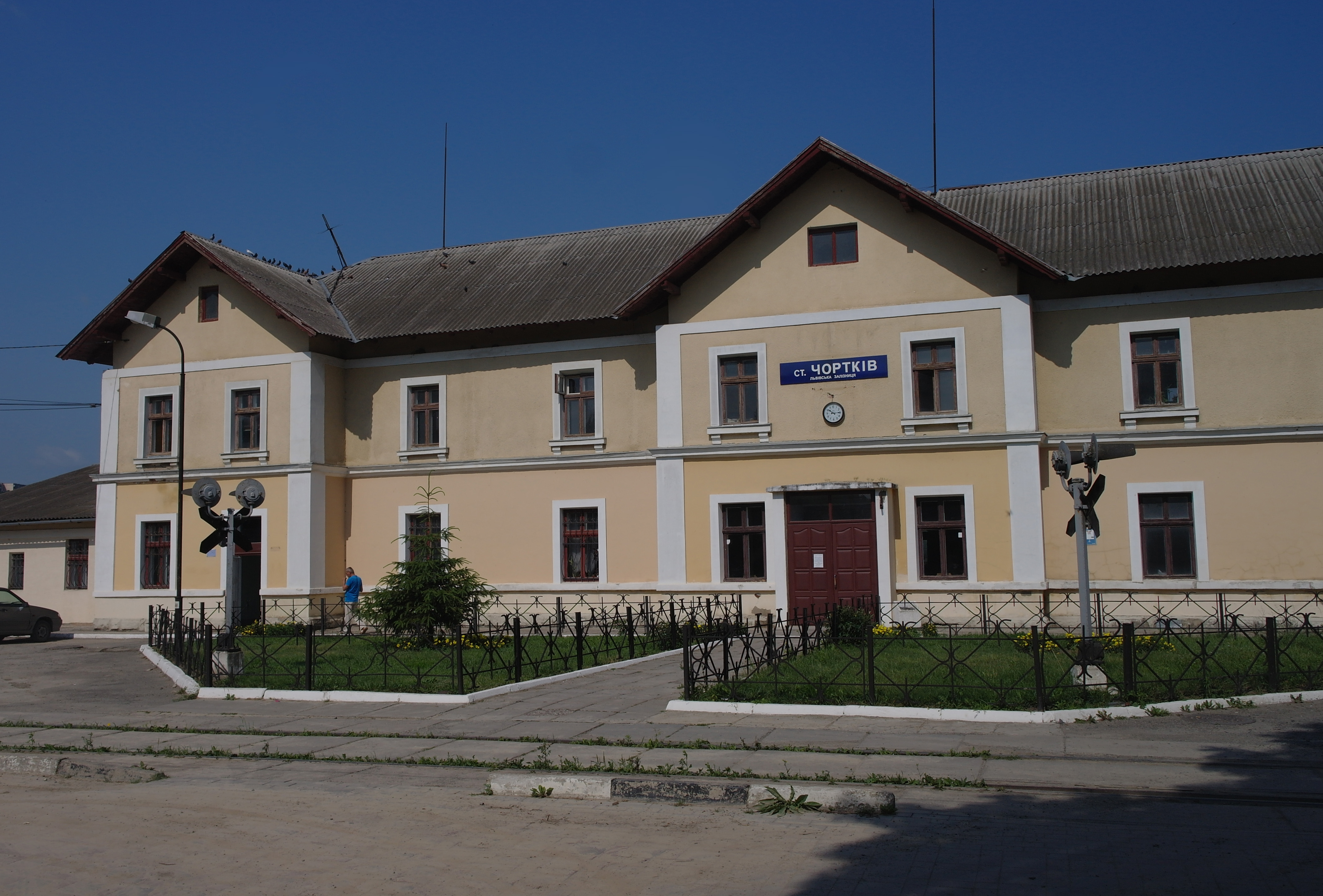 Чортків, Залізничний вокзал